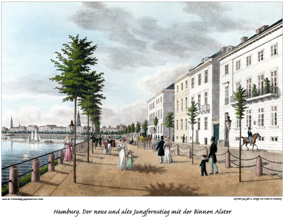 Neuer Jungfernstieg 1830. Die Zeichnung entstand kurz nach Einrichtung des Neuen Jungfernstiegs (1825).